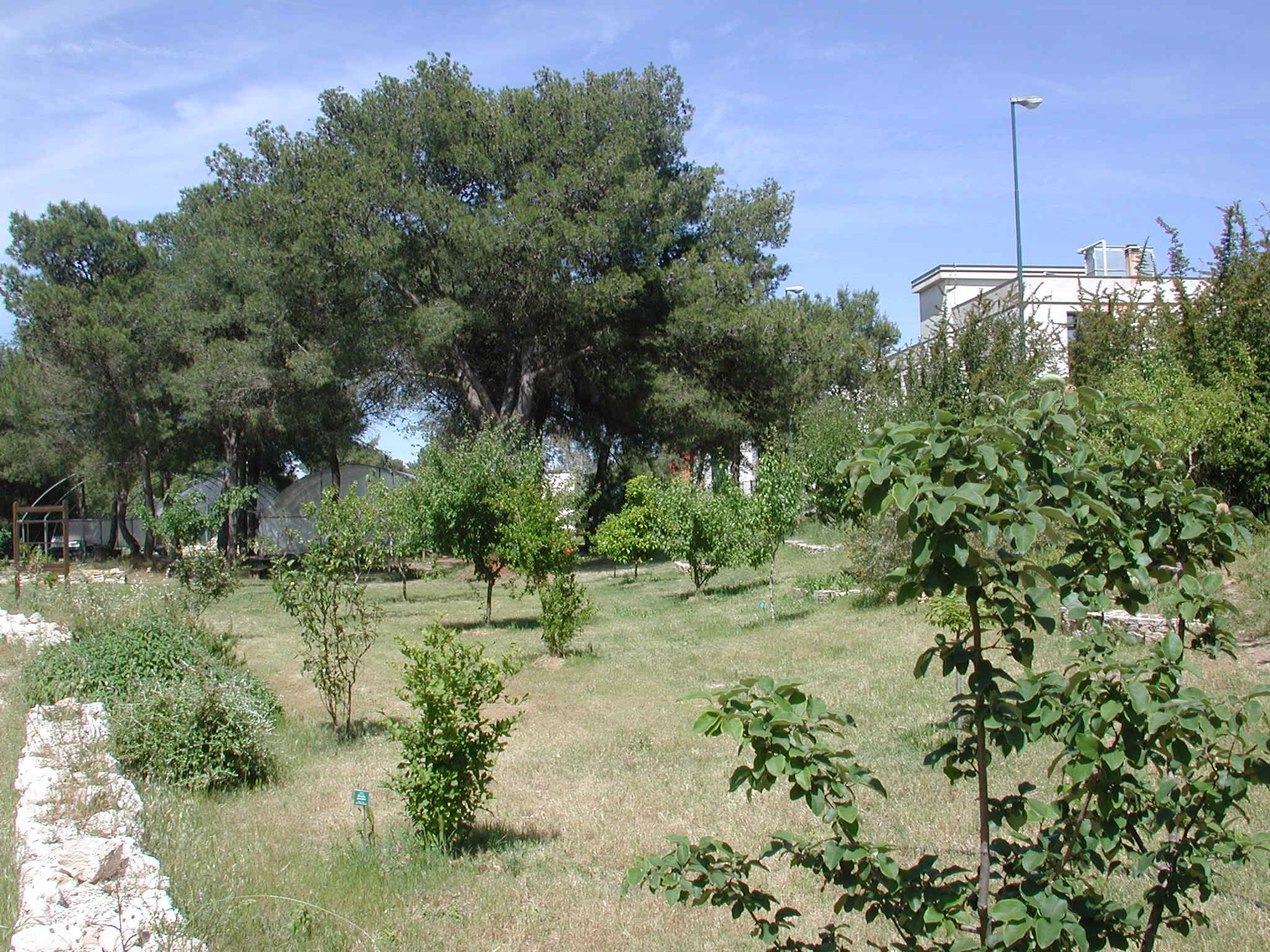 Collezione di frutti presso l'Orto Botanico di Lecce